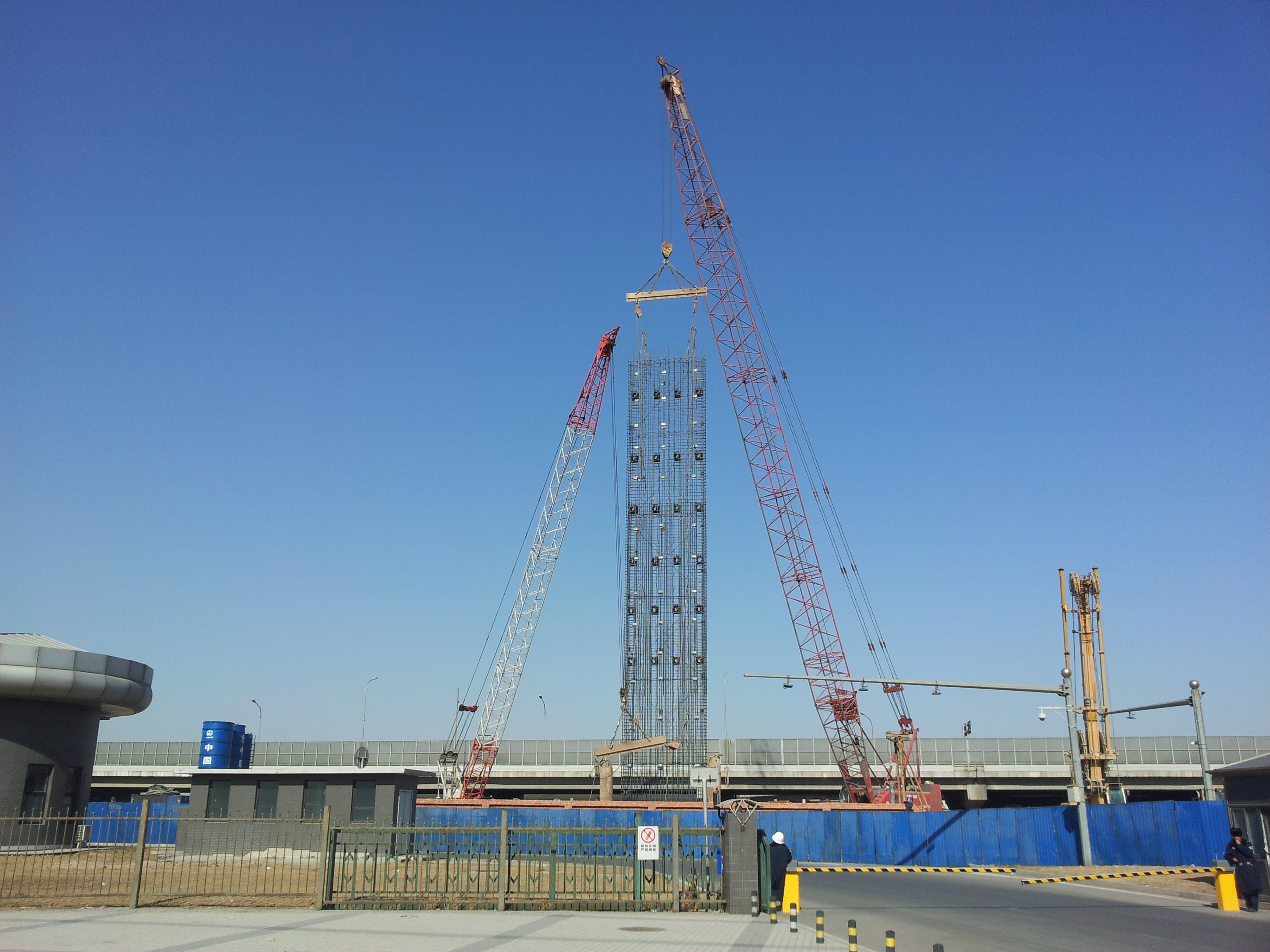 北京地铁16号线西苑站施工，正在进行地下连续墙钢筋笼吊装